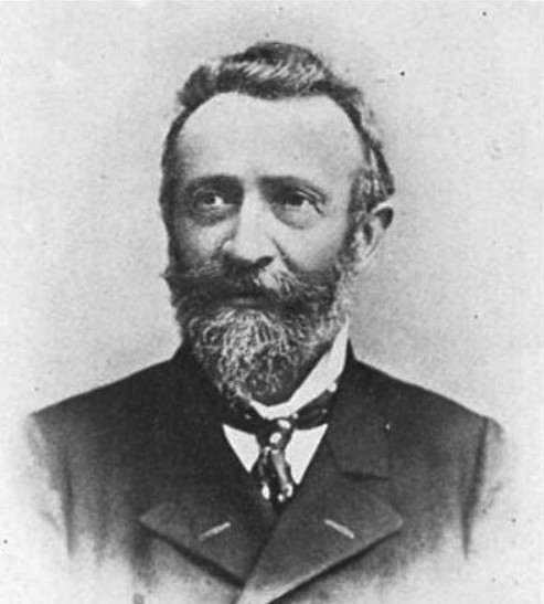 Pecz Samu építész, műegyetemi tanár